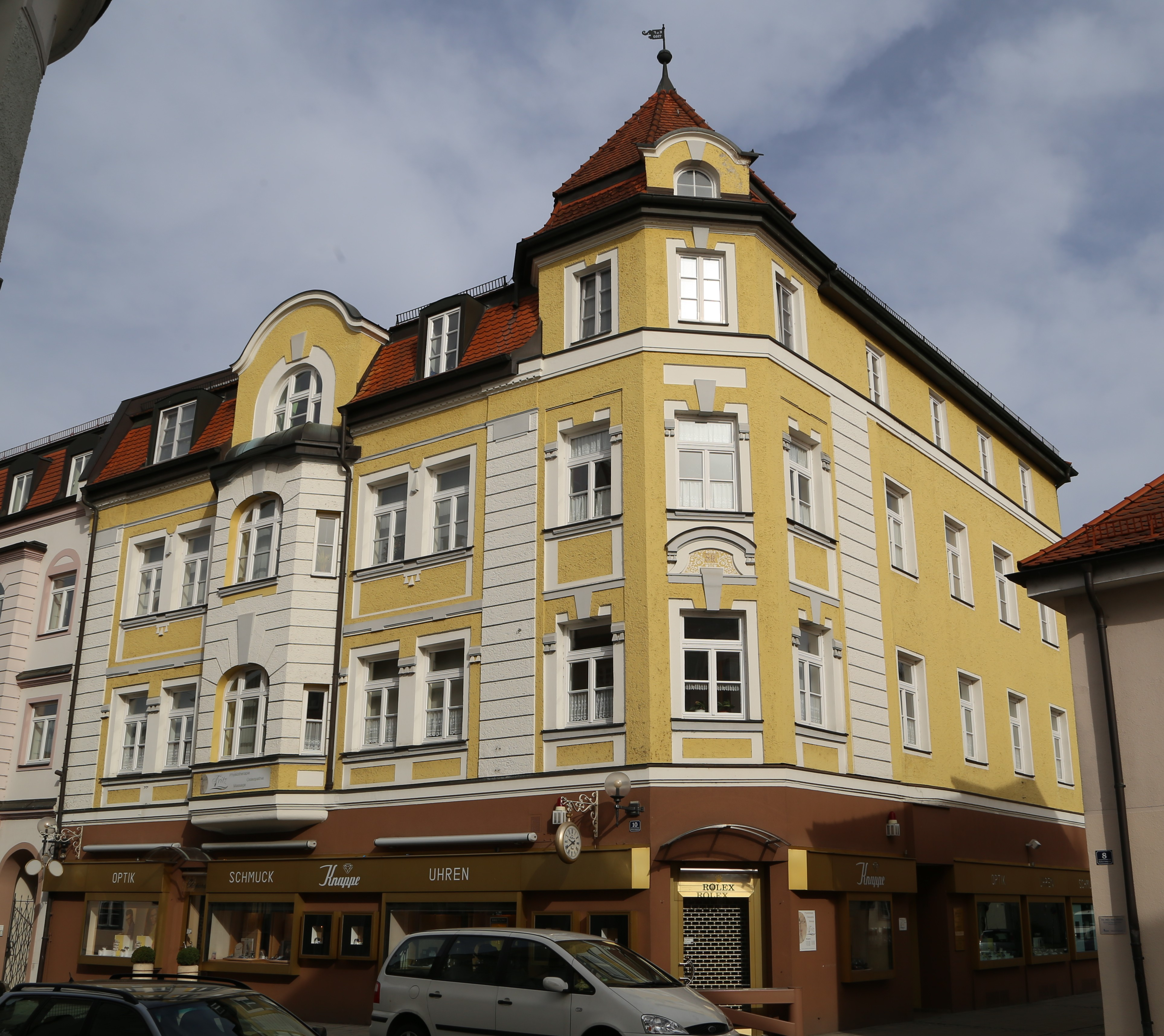 Katharinenplatz 10, Mühldorf am Inn; Wohn- und Geschäftshaus, dreigeschossiger Mansarddachbau, mit Ecktürmchen und zweistöckigem Erker, Fassade spätklassizistisch, Ende 19. Jahrhundert